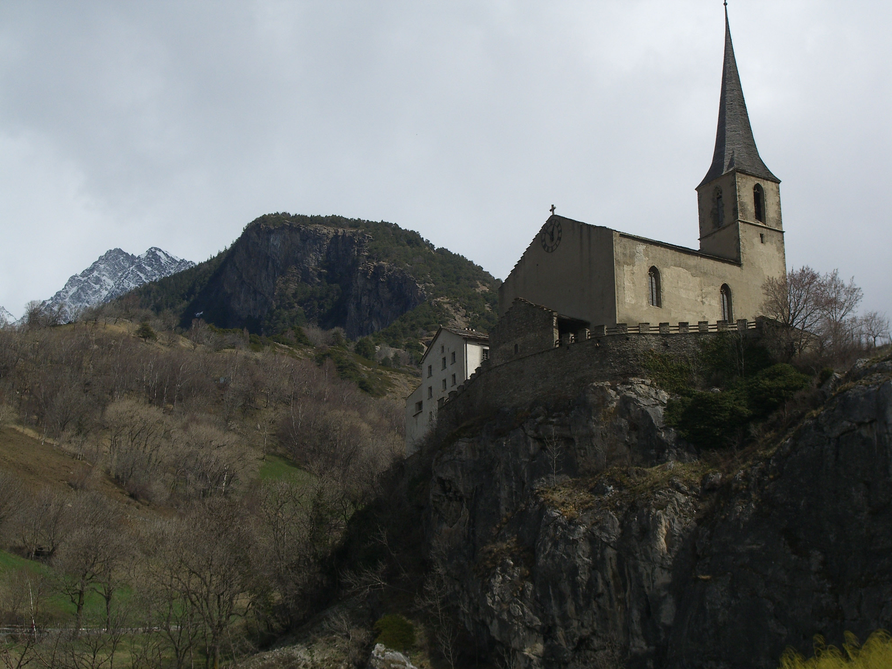 Burgkirche in Raron, mit Grabstätte des Lyrikers Rainer Maria Rilke